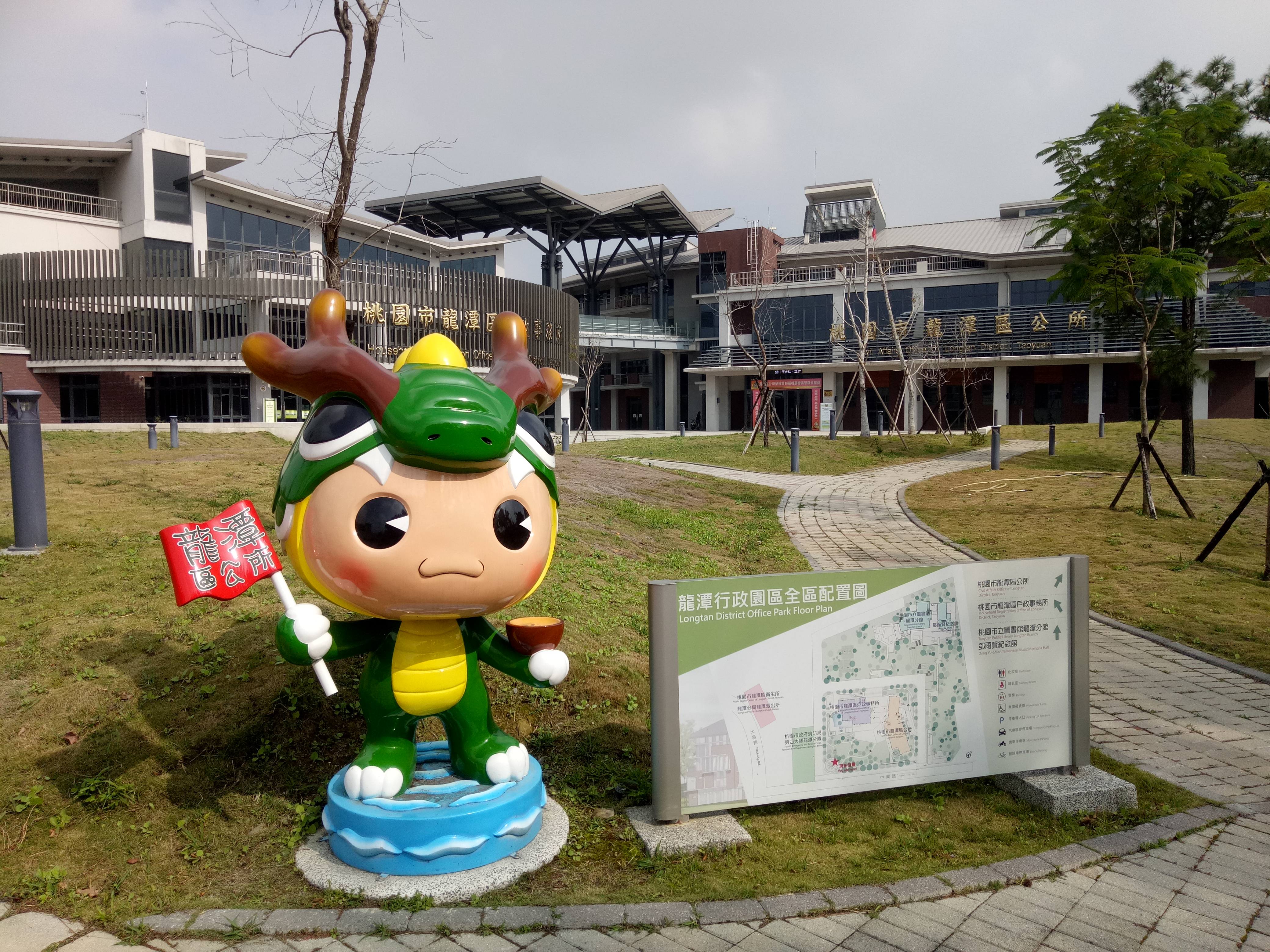 桃園市 龍潭行政園區。